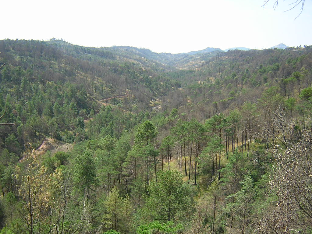 El torrent de les Fraus de l'Otzet (Granera i Monistrol de Calders, Moianès)